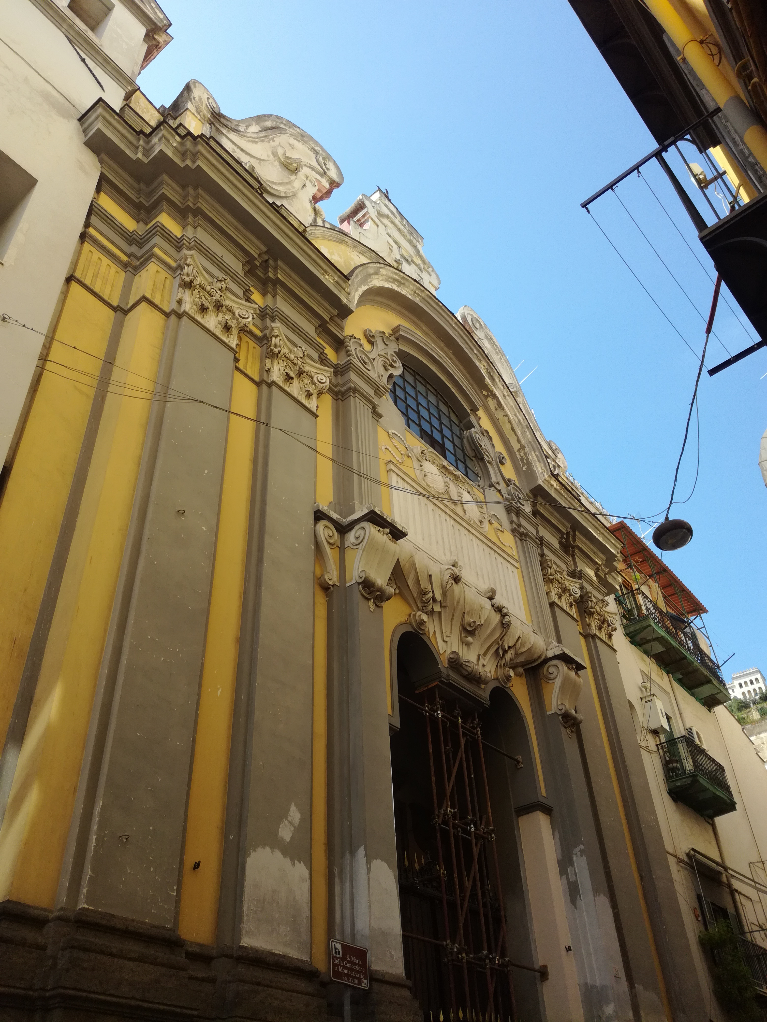 Napoli, Concezione a Montecalvario: la facciata della chiesa